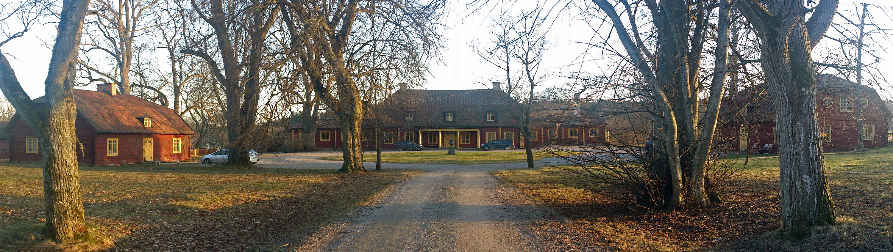 Elvesta gård, mars 2014